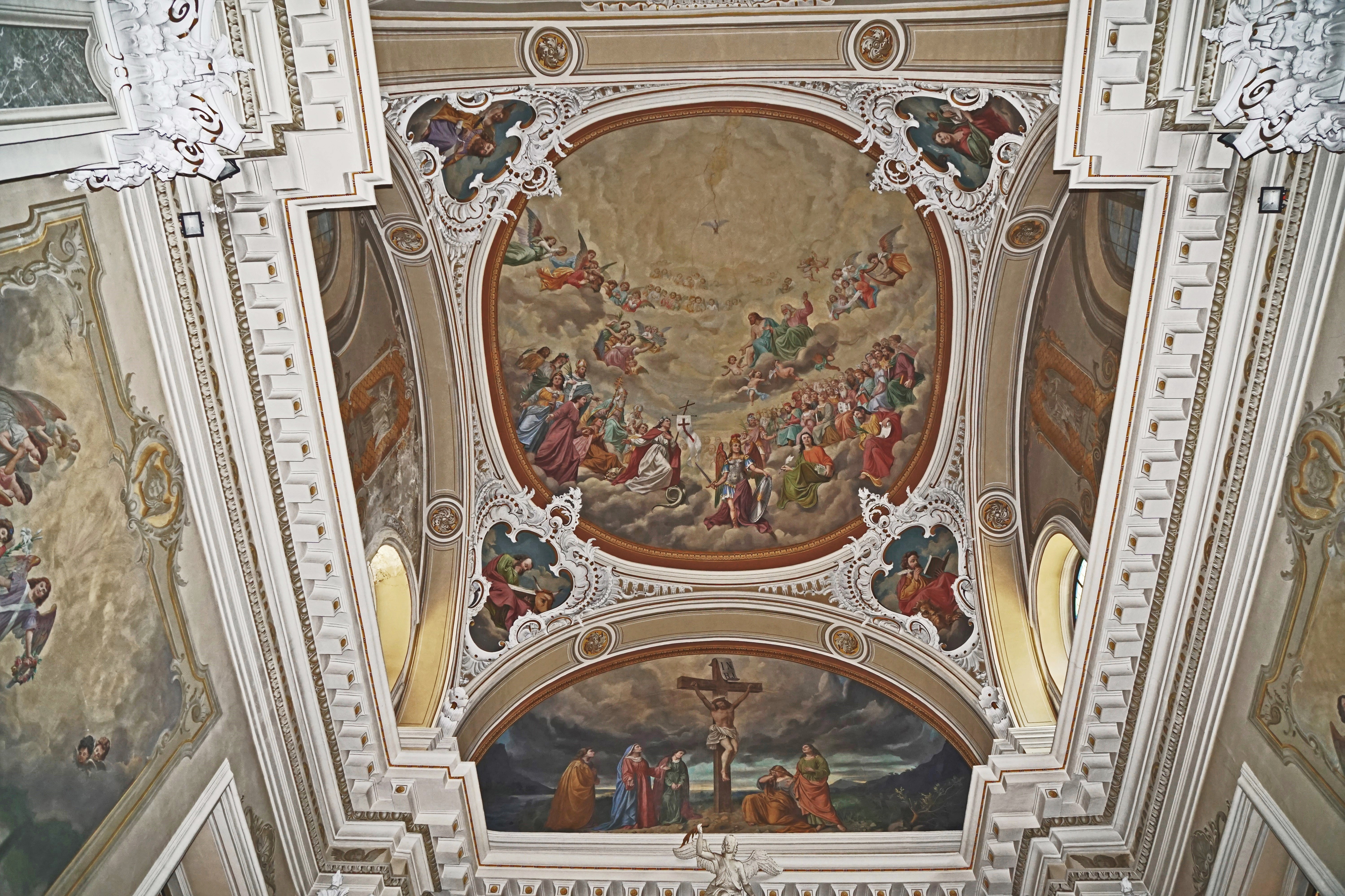 Blick in die Kuppel des Chores der Pfarrkirche St. Margareta (Sappada, Italien)